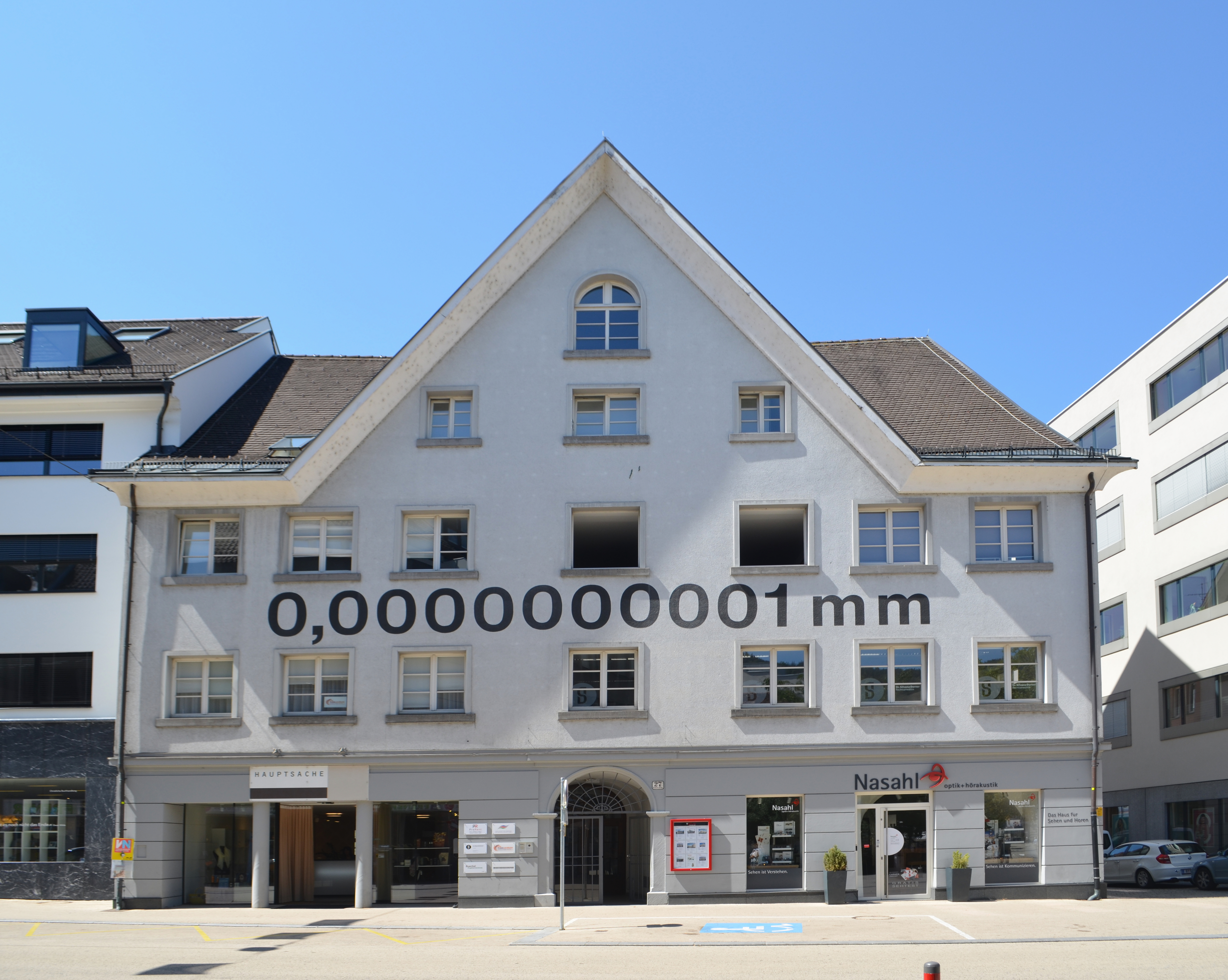 Bregenz, Rathausstraße 27